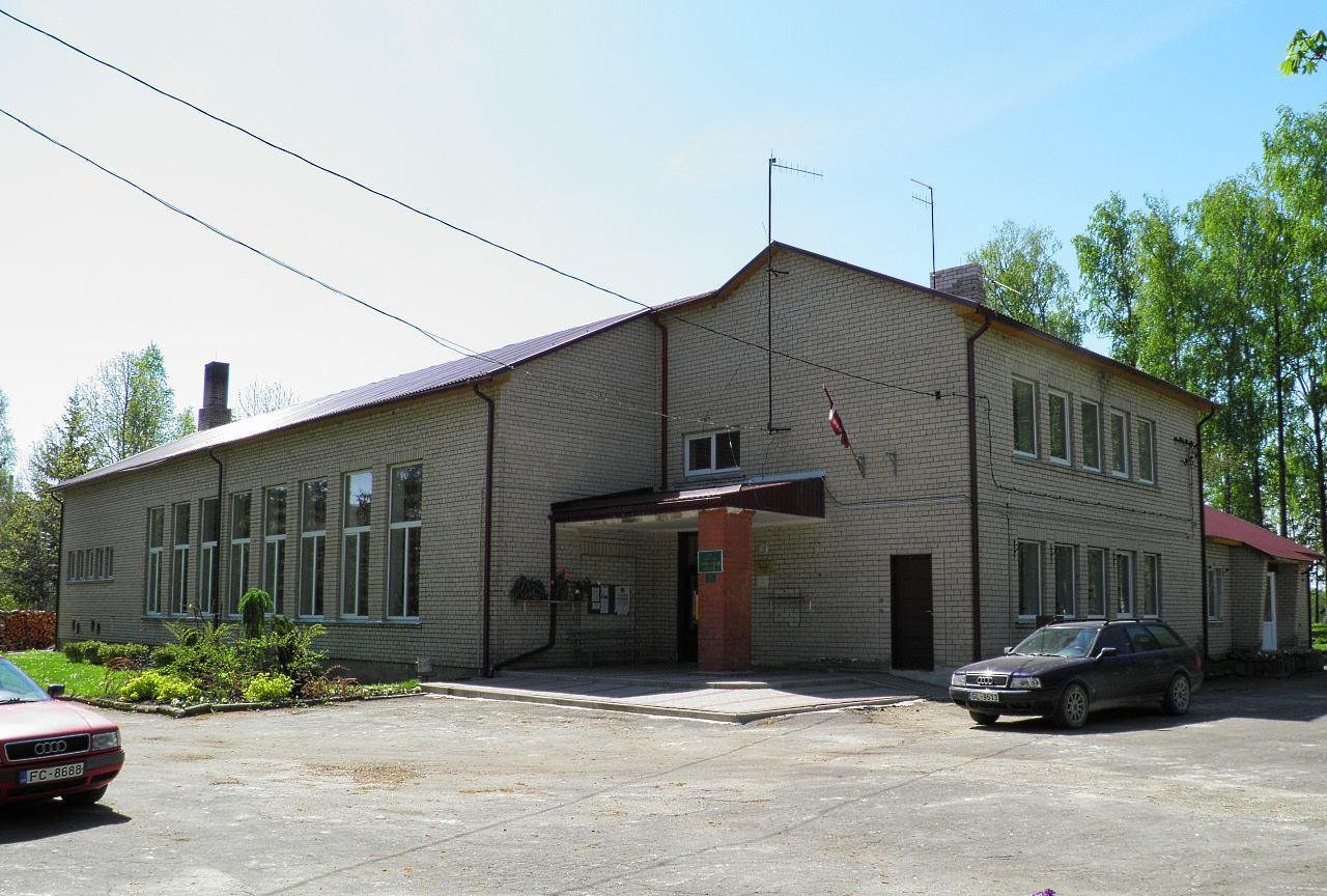 Leimaņu pagasta pašvaldība